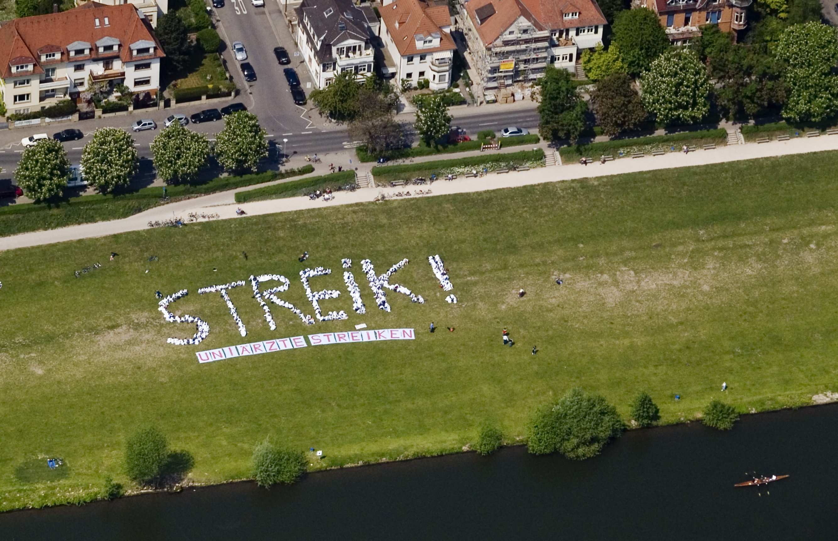 Uniärzte Heidelberg streiken - Schriftzug 'Streik' aus Menschen